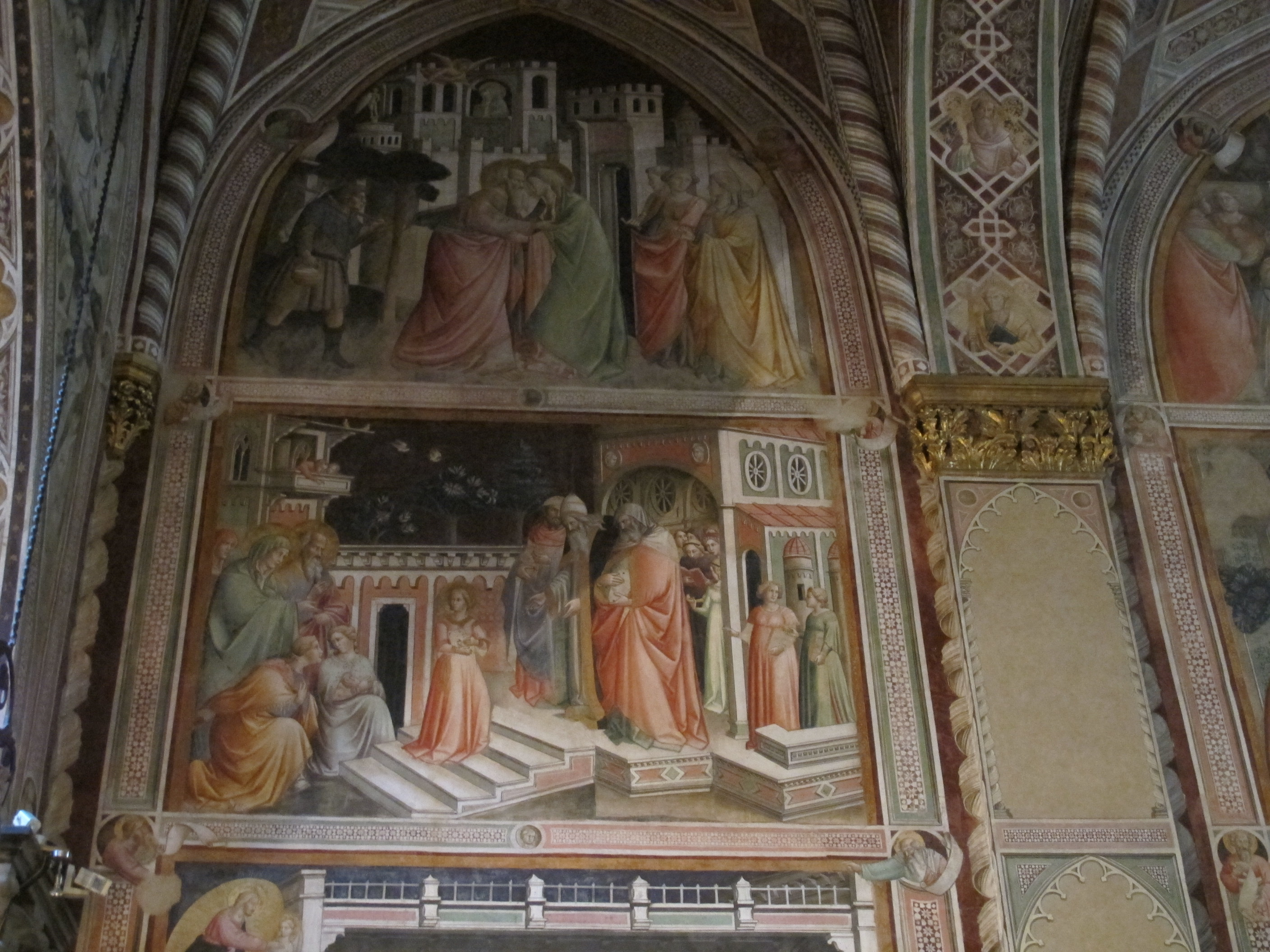 Cappella del sacro cingolo